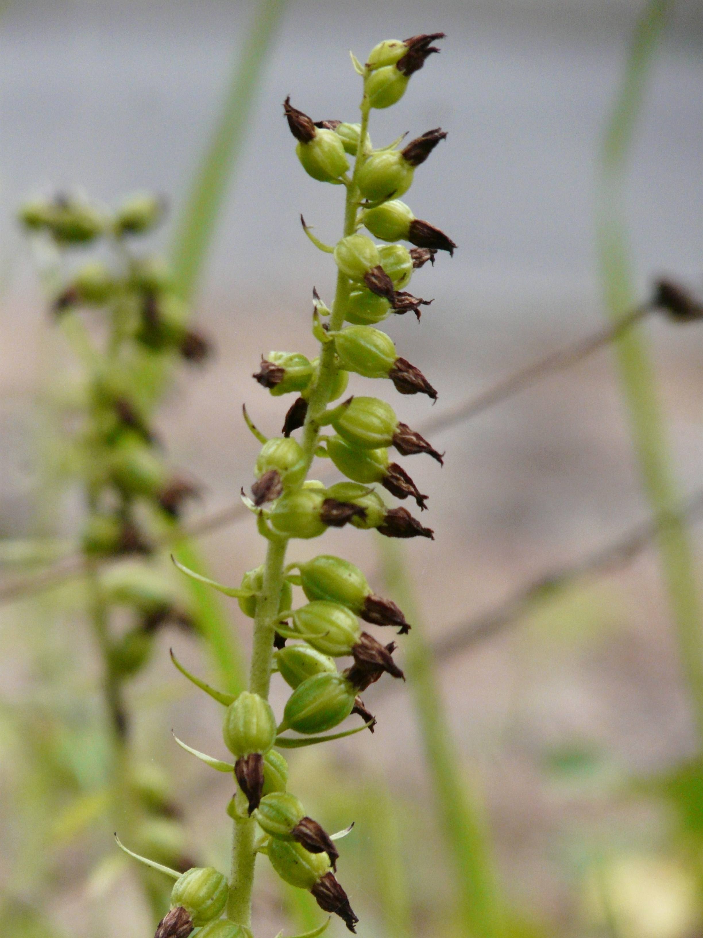 Fleurs fanées d'Épipactis de Müller (Epipactis muelleri), Trélissac, Dordogne, France